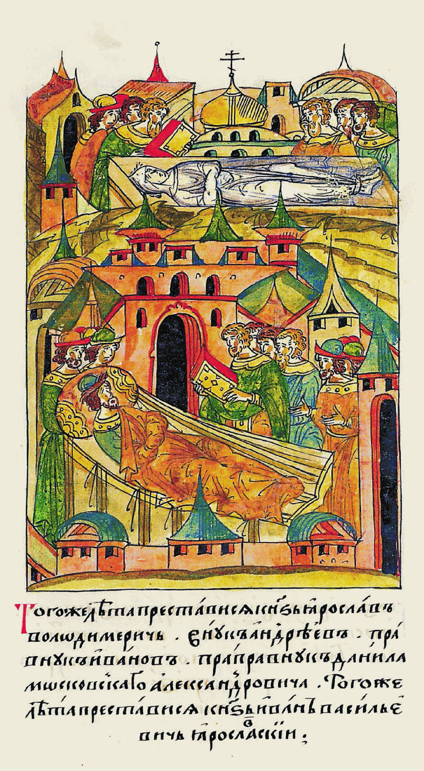 В том же году скончался князь Ярослав Влади- мирович, внук Андре- ев, правнук Иванов, праправнук Даниила Александровича Мо- сковского. В том же году скончался князь Ярославский Иван Васильевич.